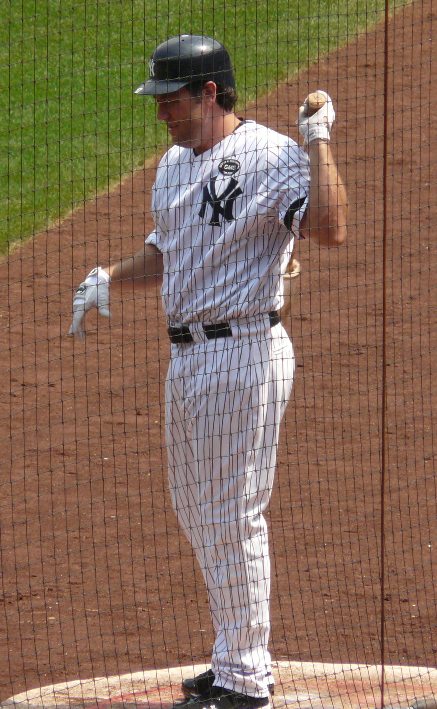 Lance Berkman